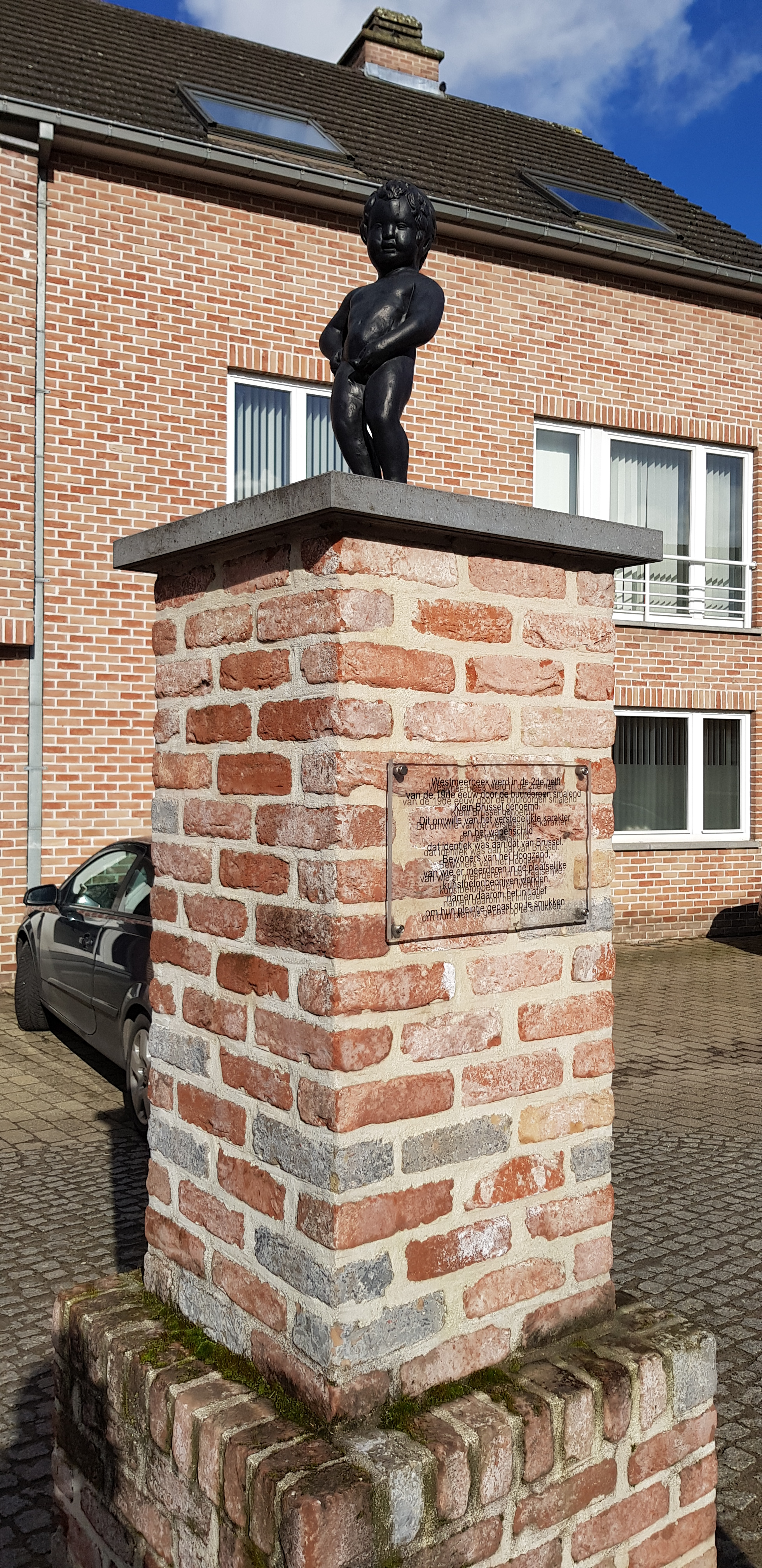 Manneken Pis van Westmeerbeek, Hulshout, België